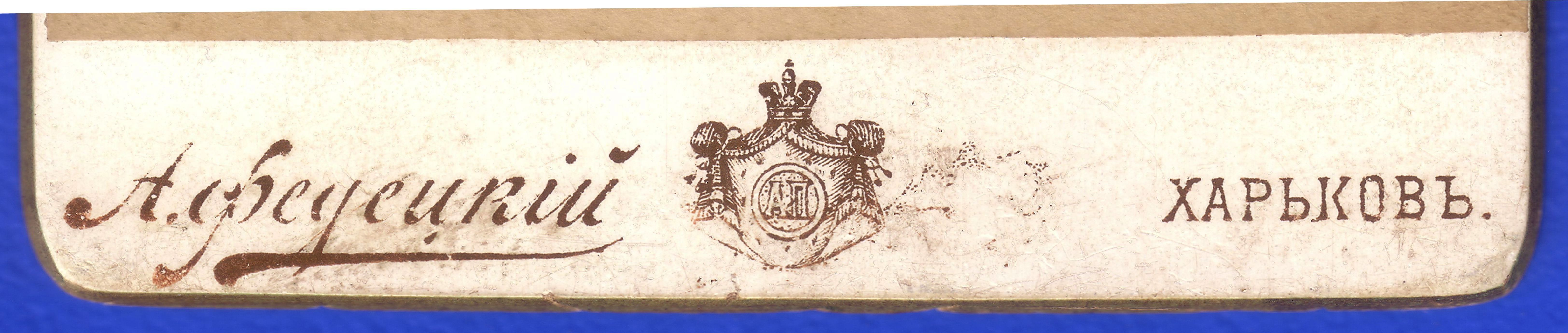 Эмблема фотографического ателье Альфреда Федецкого в Харькове (на лицевой стороне фото).